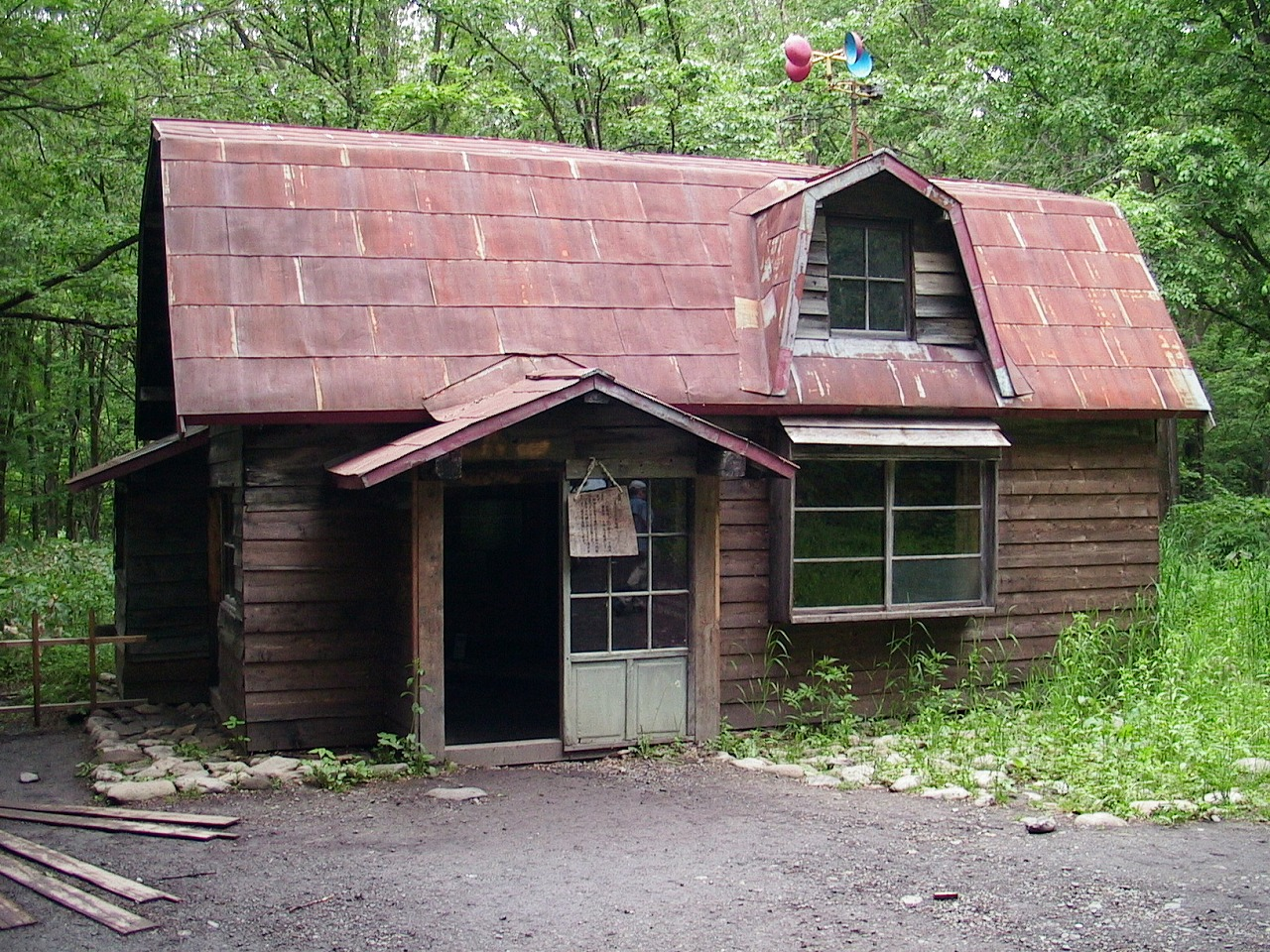 五郎3番目の家 麓郷の森IMG Akiyoshi's Room